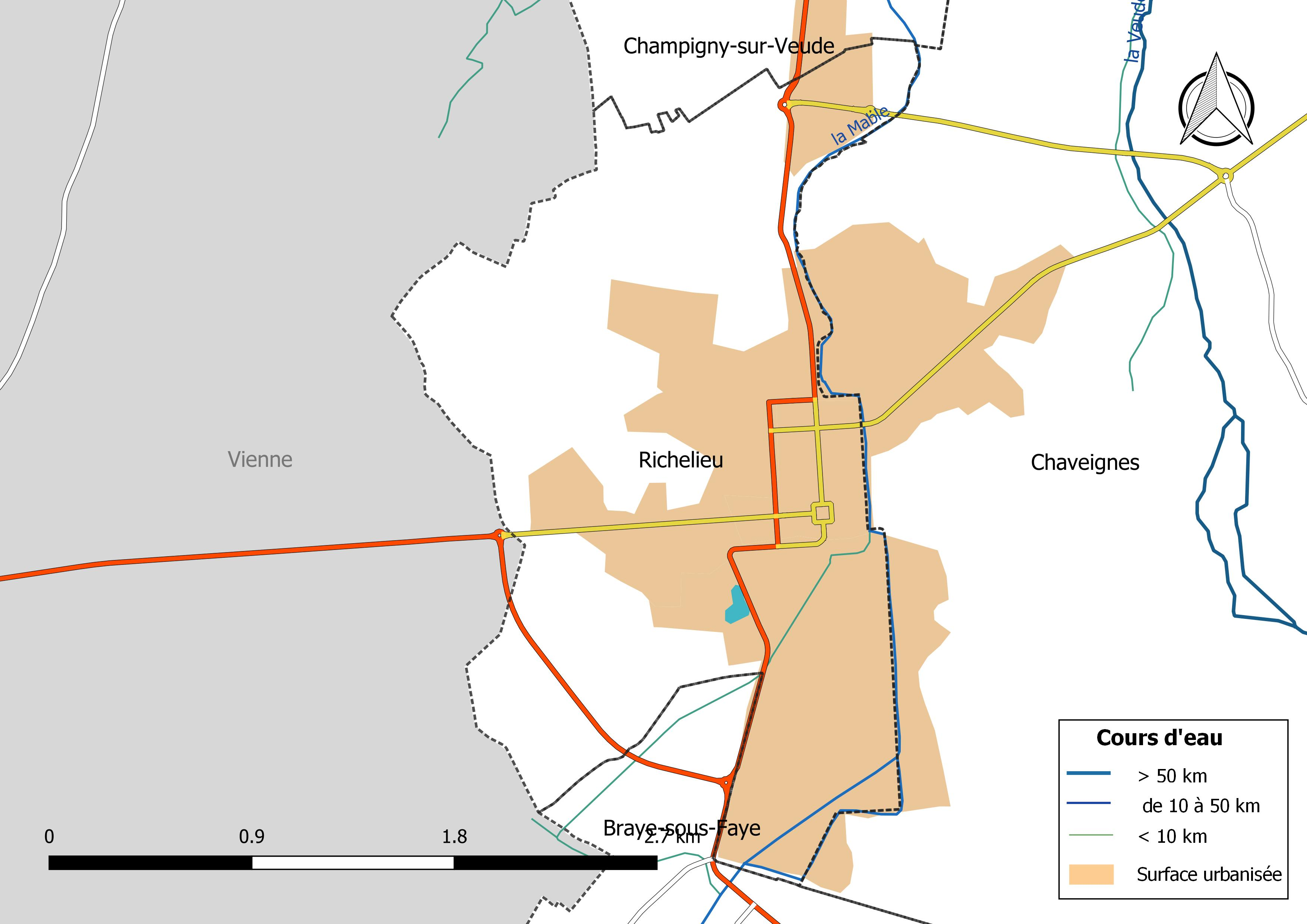 Carte du réseau hydrographique de la commune de Richelieu (Indre-et-Loire) (France).